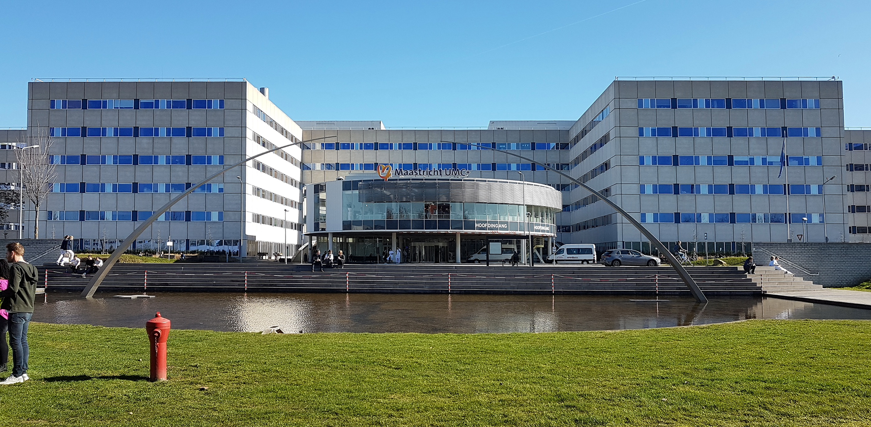 Zicht uit het westen op de vijver met het Debyemonument aan de Peter Debyelaan in Maastricht. Op de achtergrond de gebouwen van het Maastrichts Universitair Medisch Centrum Plus (MUMC+), het vroegere academisch ziekenhuis en de medische faculteit van de Universiteit Maastricht.